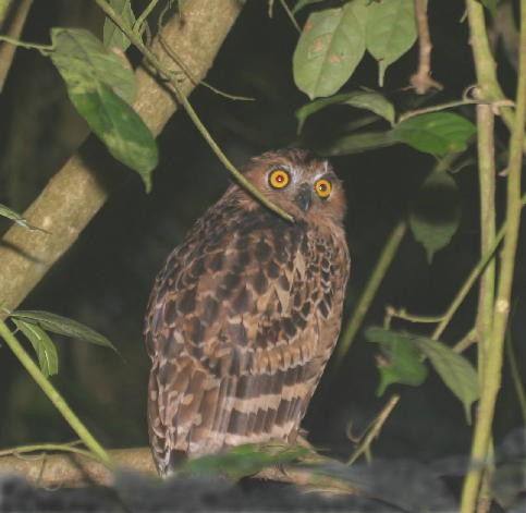 Ketupa ketupu Buffy Fish Owl (Bangla:Pecha)